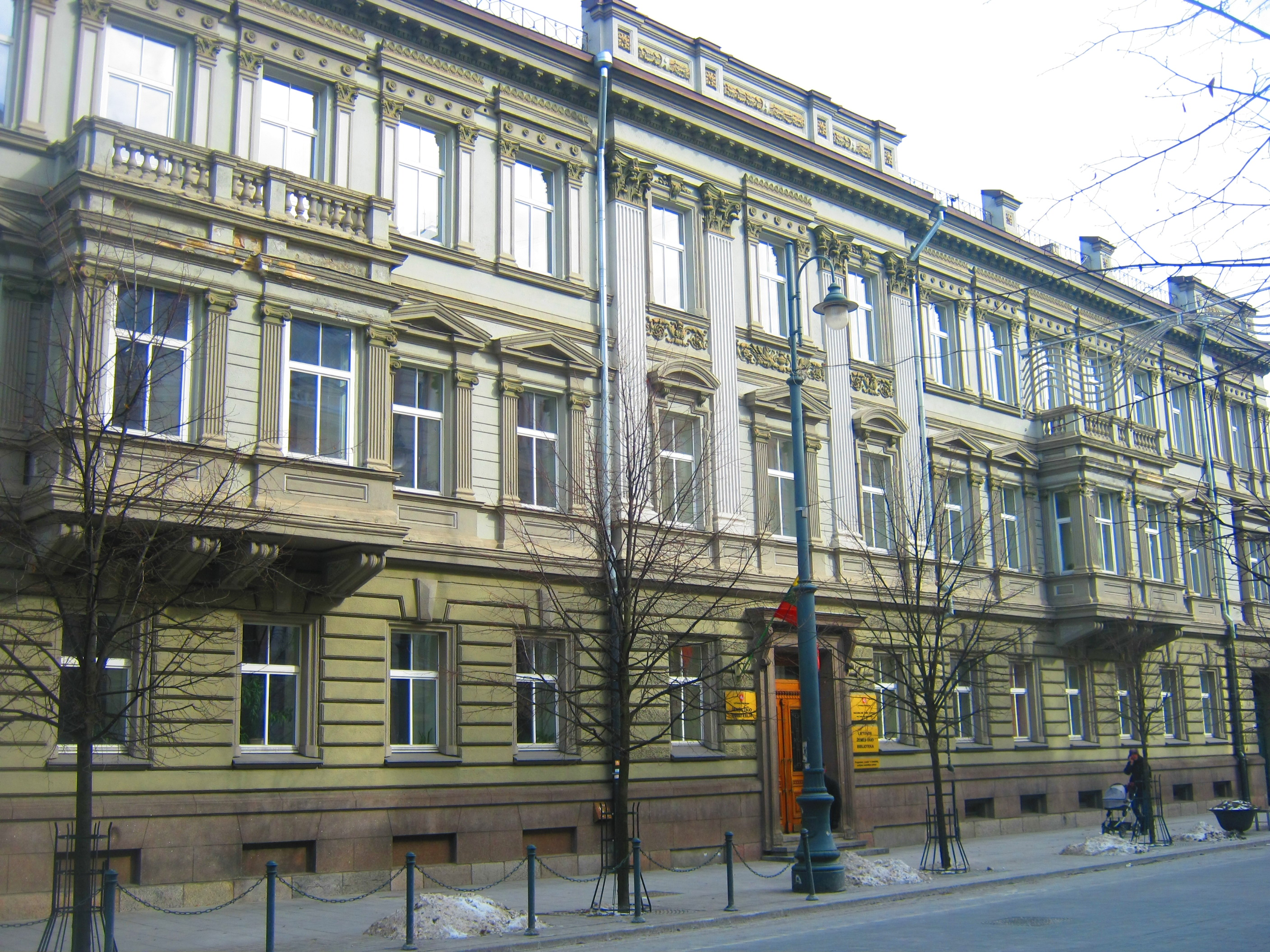 Žemės ūkio ministerija ir žemės ūkio biblioteka